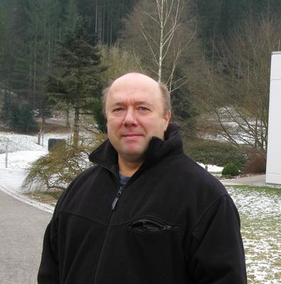 Foto di Rod Downey